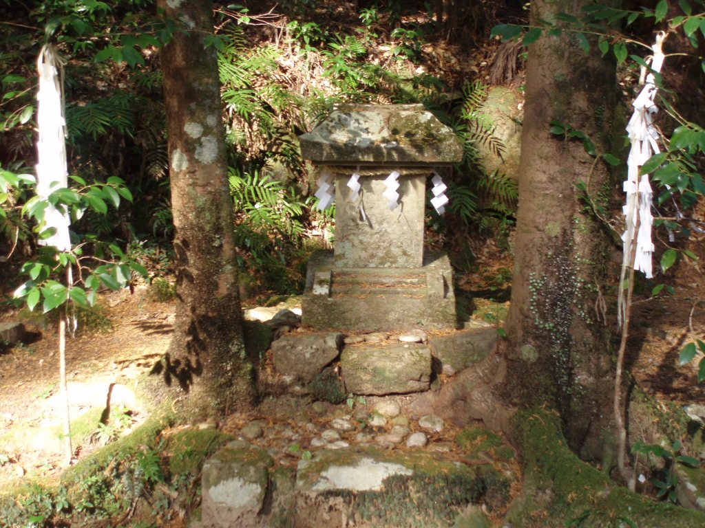 月見岡神社